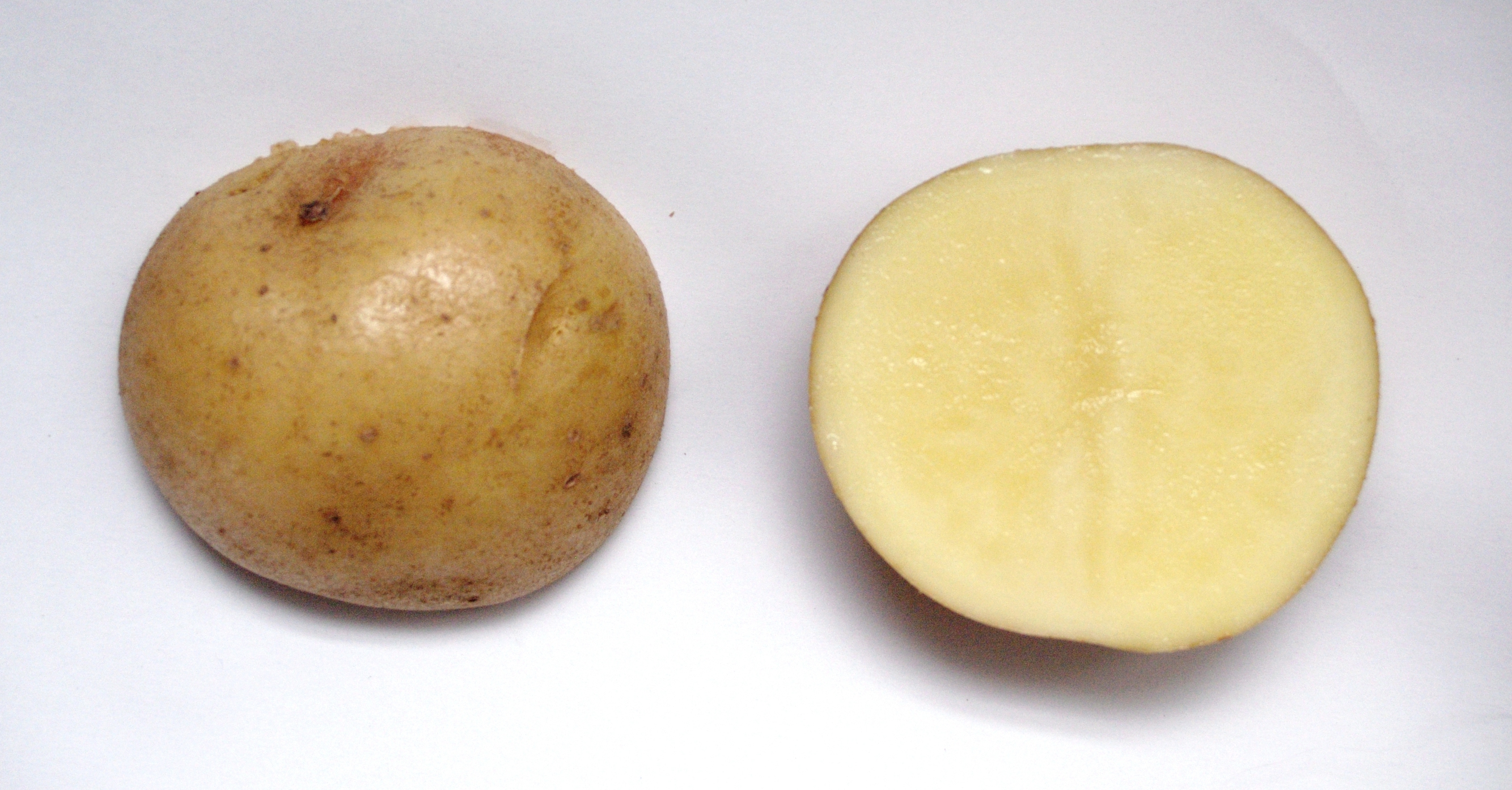 日本・長崎県のじゃがいも品種「ニシユタカ」